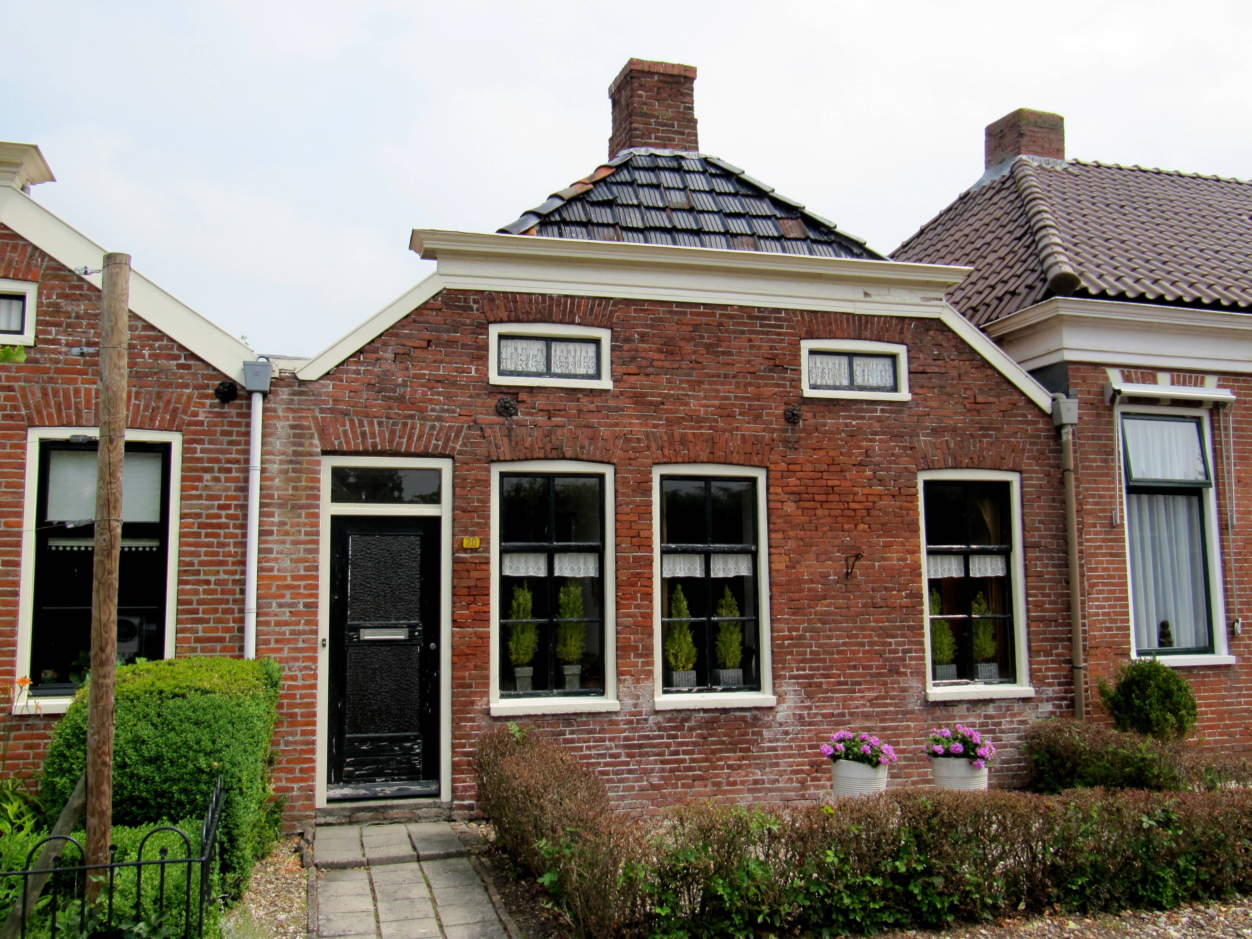 Eenvoudig PAND onder flauw hellend zadeldak